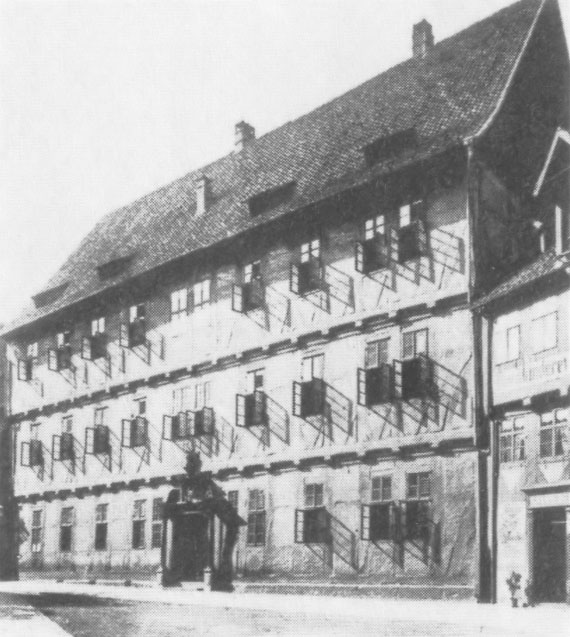 Gymnasium Andreanum in Hildesheim, Foto um 1868